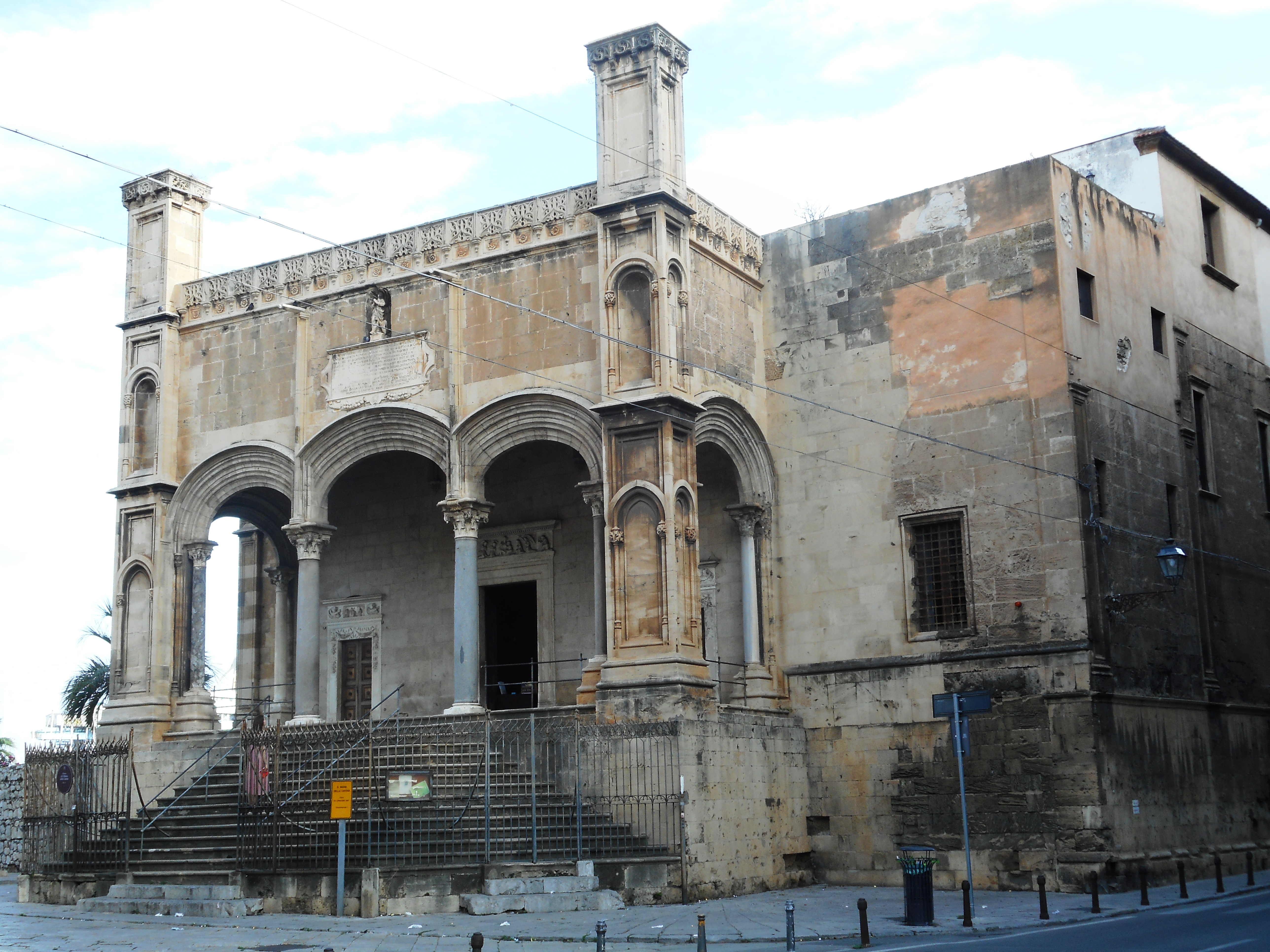 Chiesa di Santa Maria della Catena a Palermo attribuita a Matteo Carnelivari